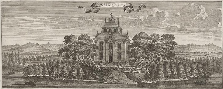 Stora Hornsberg, även Hornsbergs slott på Kungsholmen i Stockholm